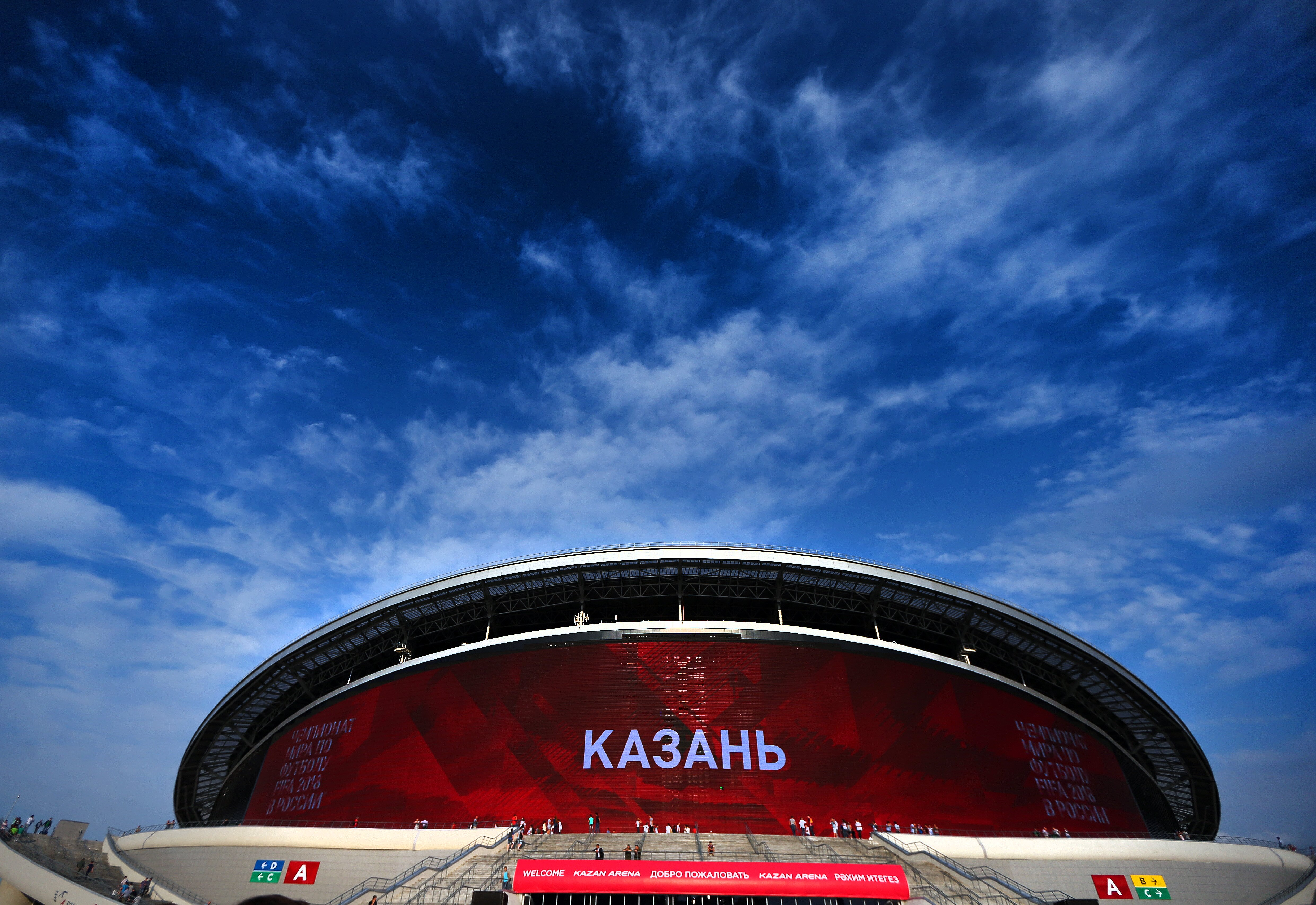 Медиафасад Казань Арены